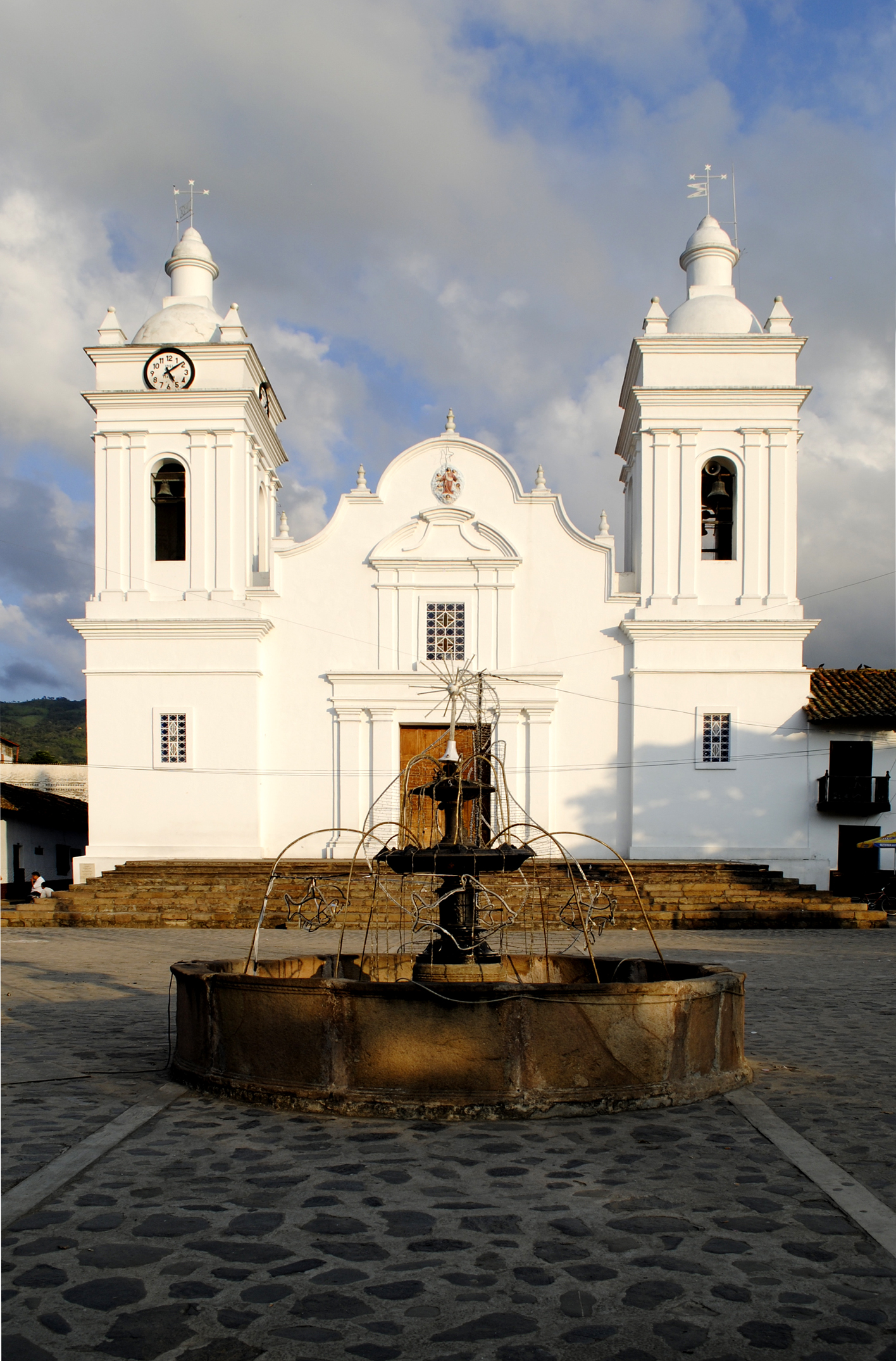 Sector Antiguo de la ciudad de Guaduas, costado oriental de la Plaza de la Constitución. Se colocó su primera piedra el primero de agosto de 1809 y fue el último diseño de fray Domingo de Petres.